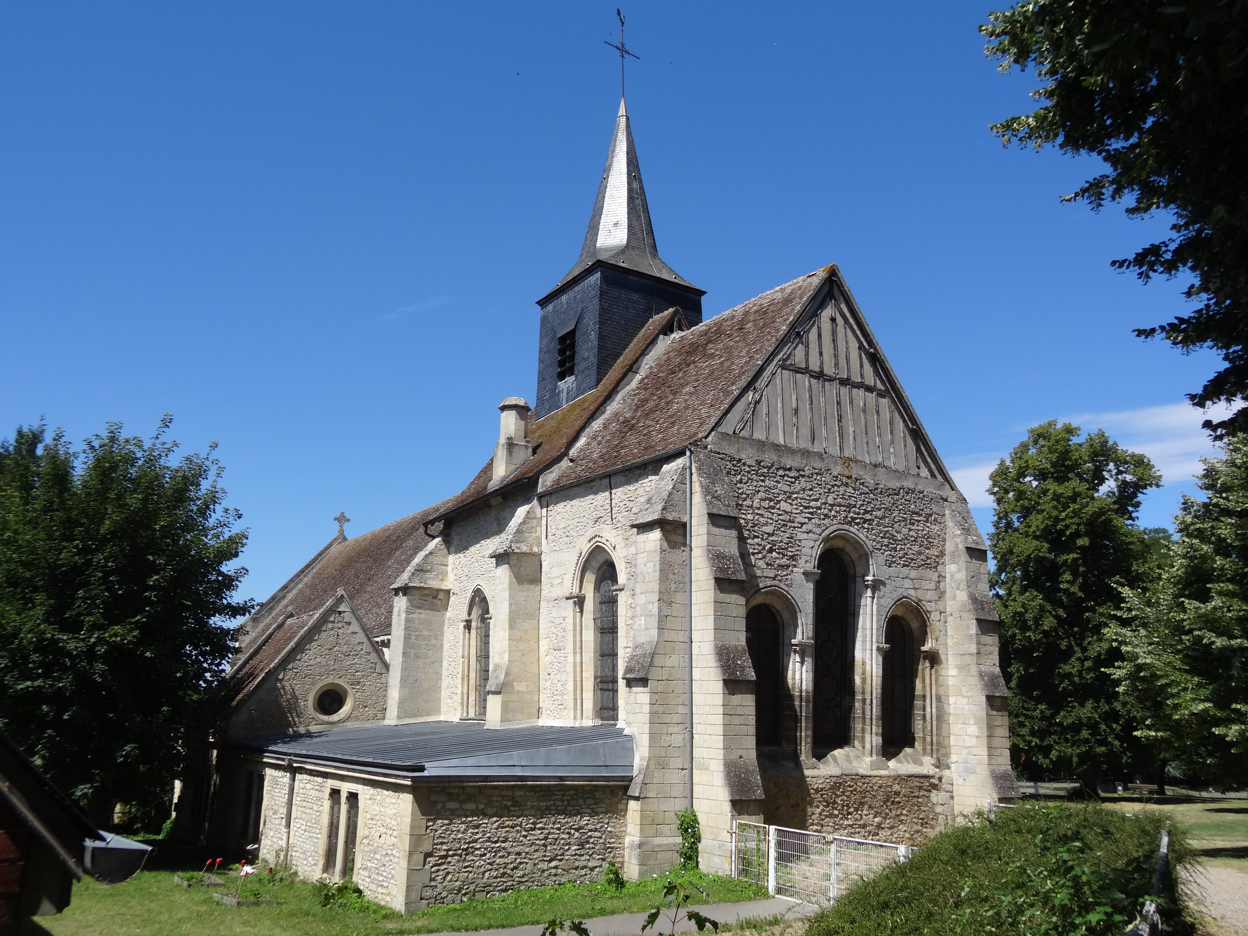 Église Sainte-Madeleine de Trie-Château - voir titre.